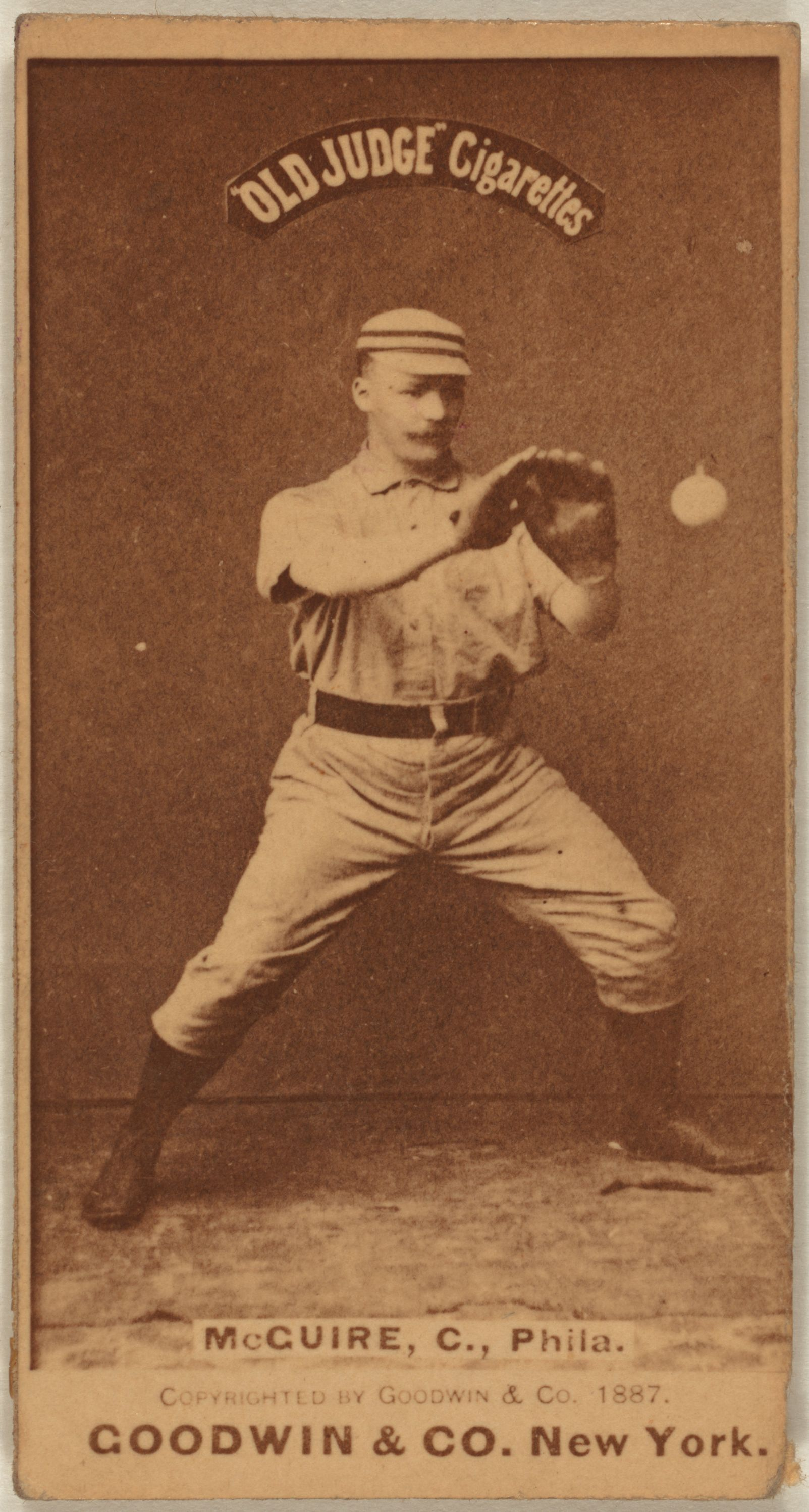 Deacon McGuire